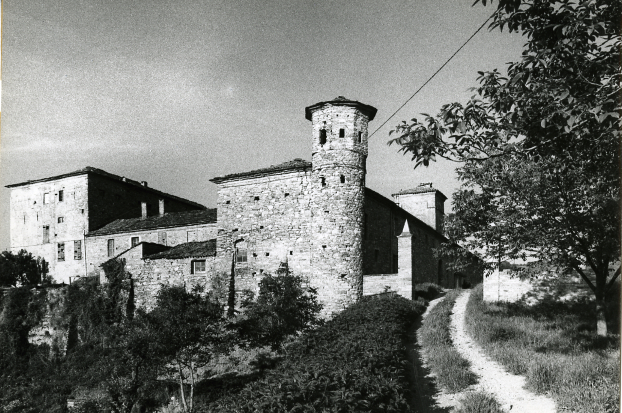 Servizio fotografico : Langhirano, 1976 / Paolo Monti. - Stampe: 4 : Positivo b/n, gelatina bromuro d'argento/ carta, 24x30. - ((Al verso delle stampe manoscritti i numeri dei negativi corrispondenti: 2846/7-8, 2856/4-5. Sul coperchio della scatola, manoscritto a pennarello: "Emilia/ Modena - Parma - Piacenza - Reggio E.". Le stampe 2846/7-8 sono unite tra loro così come le stampe 2856/4-5. - Occasione: Documentazione monumenti artistici Emilia-Romagna. - Fonte: Fattura di Paolo Monti: IV. Commesse/ Fattura n. 9/ Fotografie monumenti artistici Emilia-Romagna (1976/07/05), presso Archivio Paolo Monti